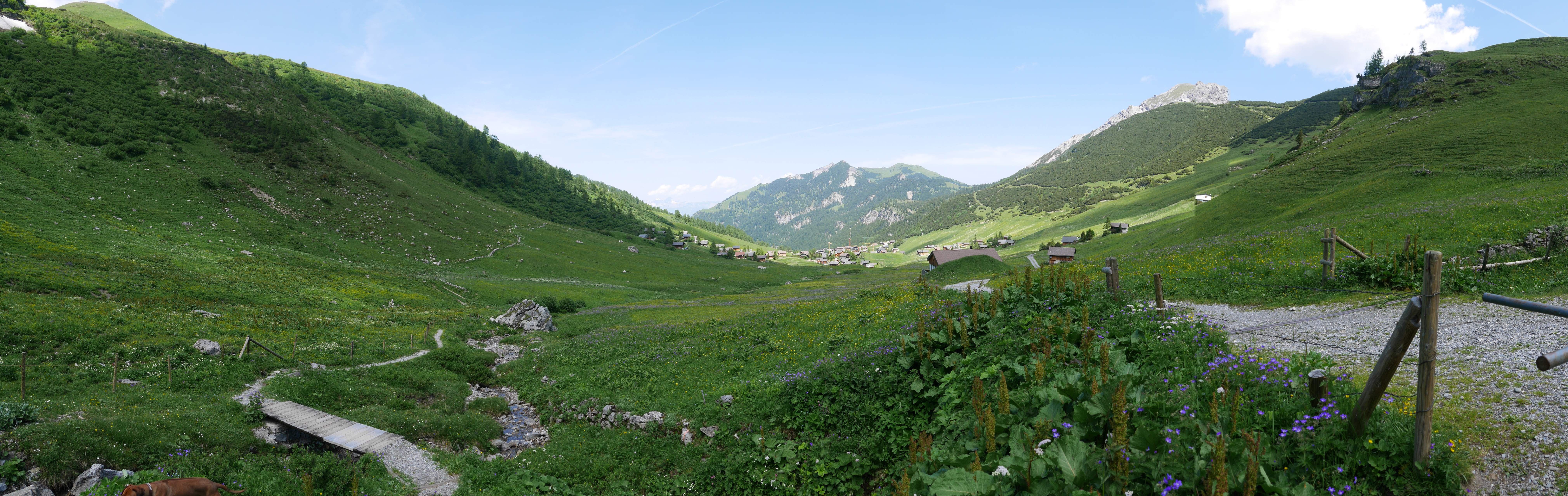 Malbun, Liechtenstein